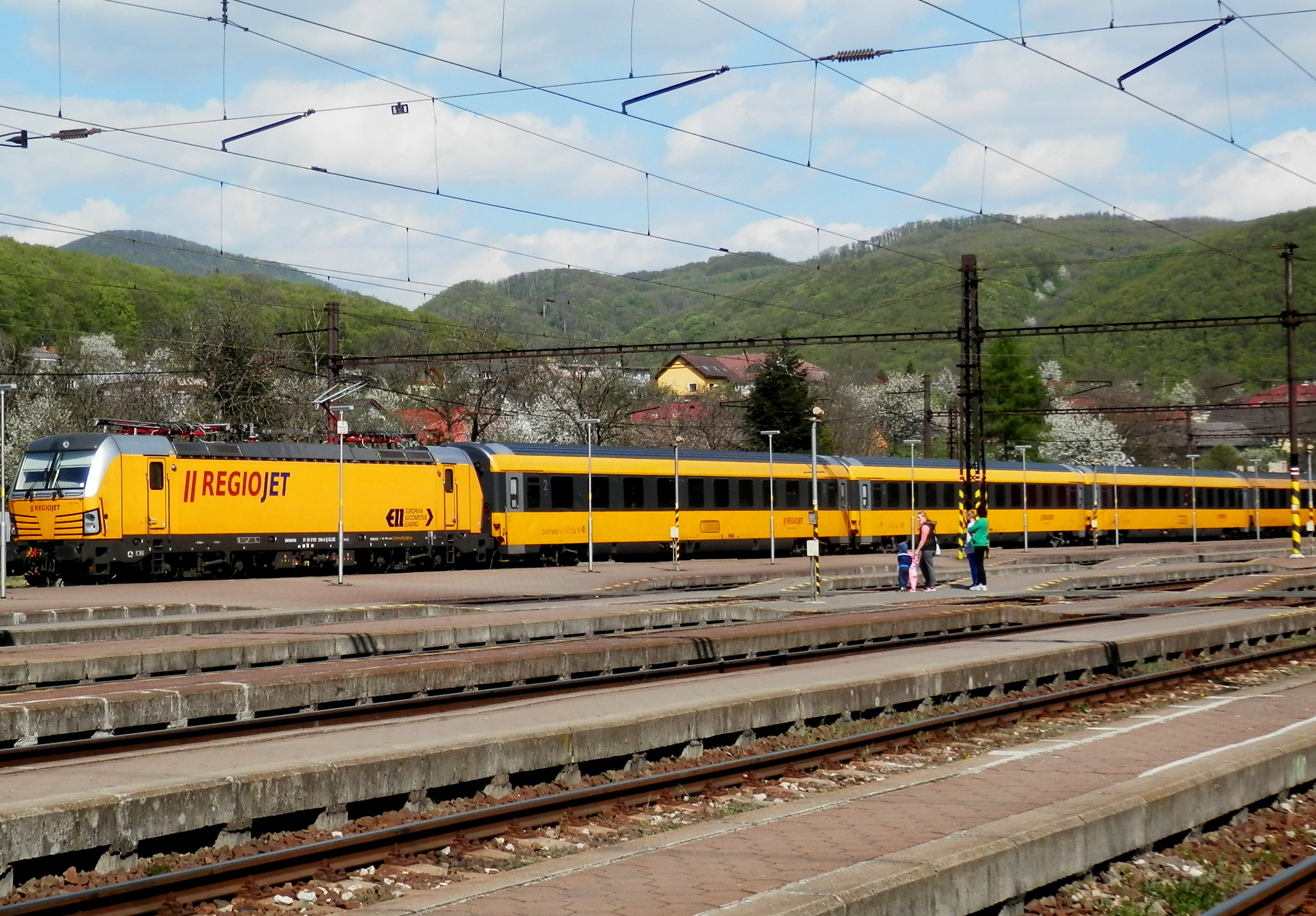 Rýchlik RegioJet v železničnej stanici Kysak. Okres Košice okolie.